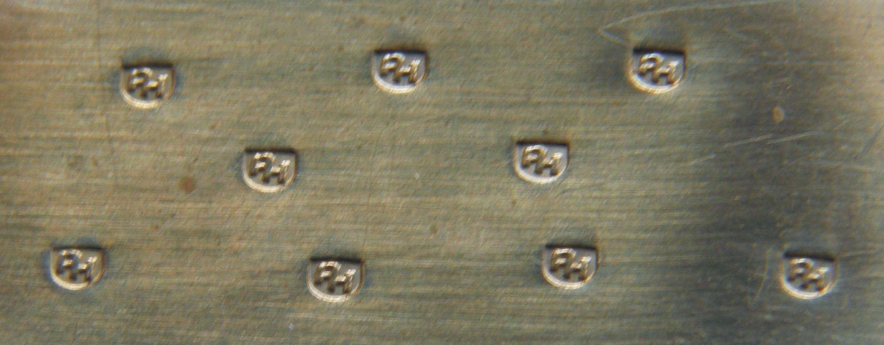 Wzór znaku złotnika na mosiężnej płytce